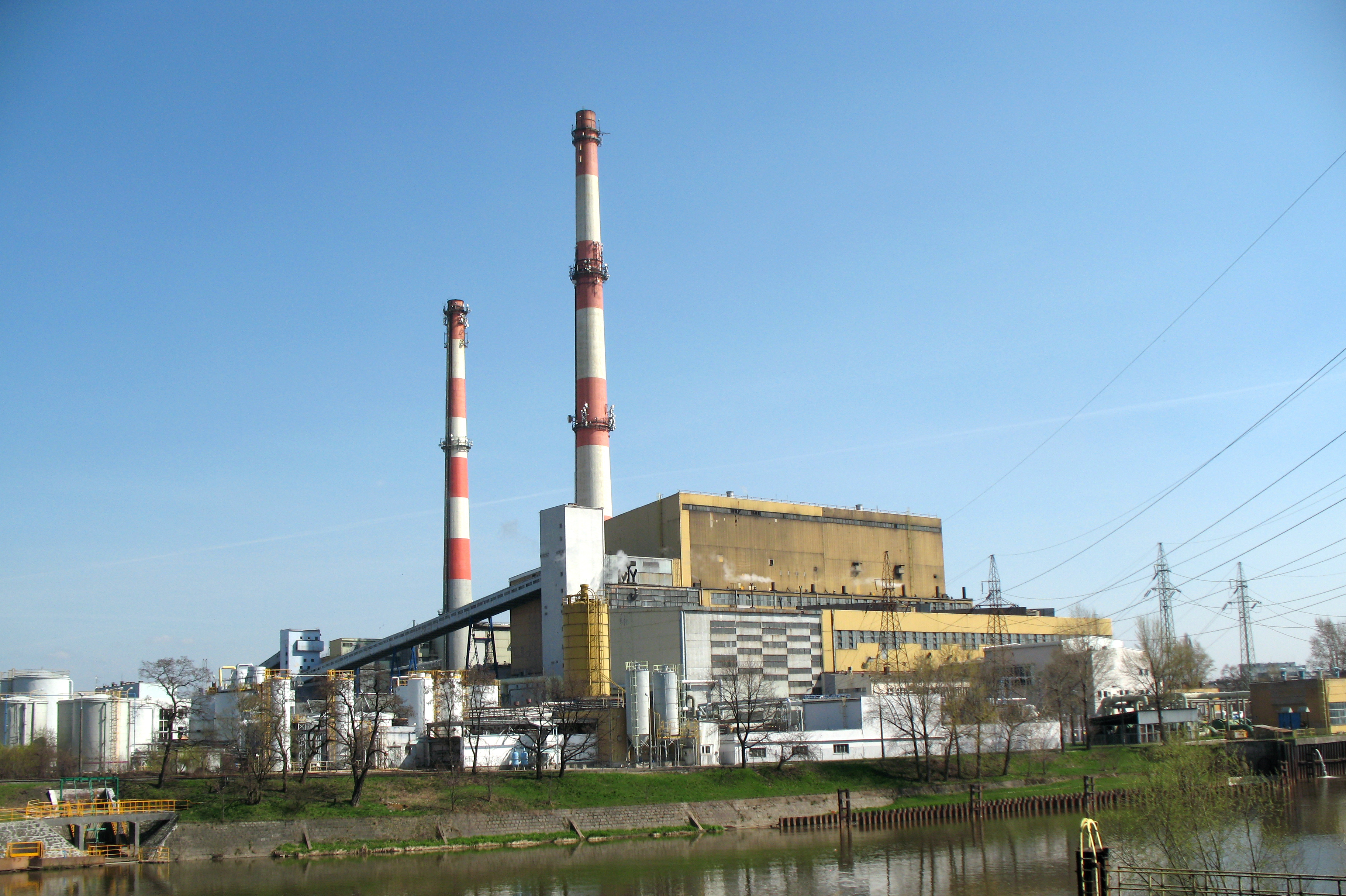 Wrocławska elektrociepłowania od strony zachodniej widziana z mostu kolejowego nad Odrą Dolną